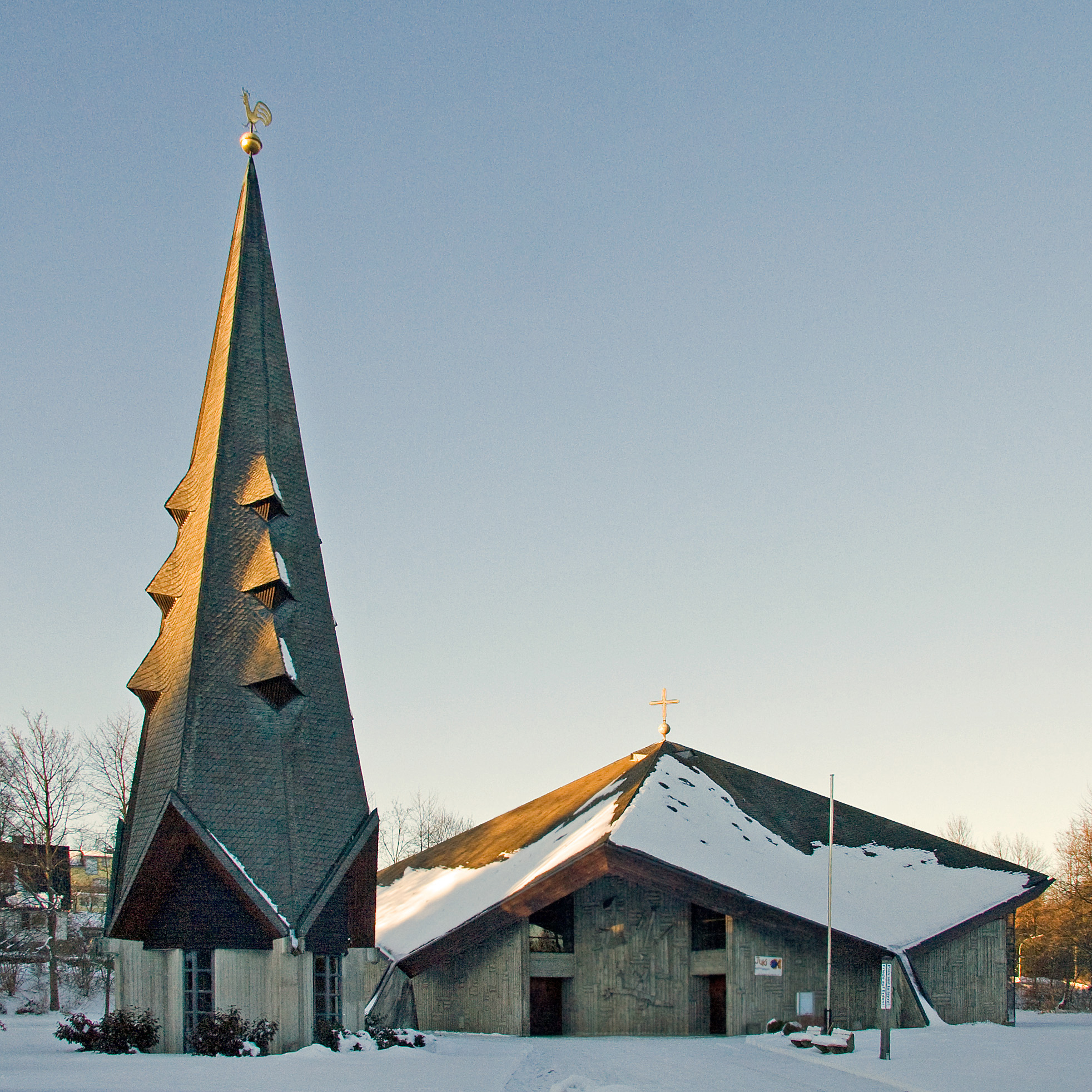 St. Michaelkirche in Brilon-Gudenhagen, 1968–1970 erbaut